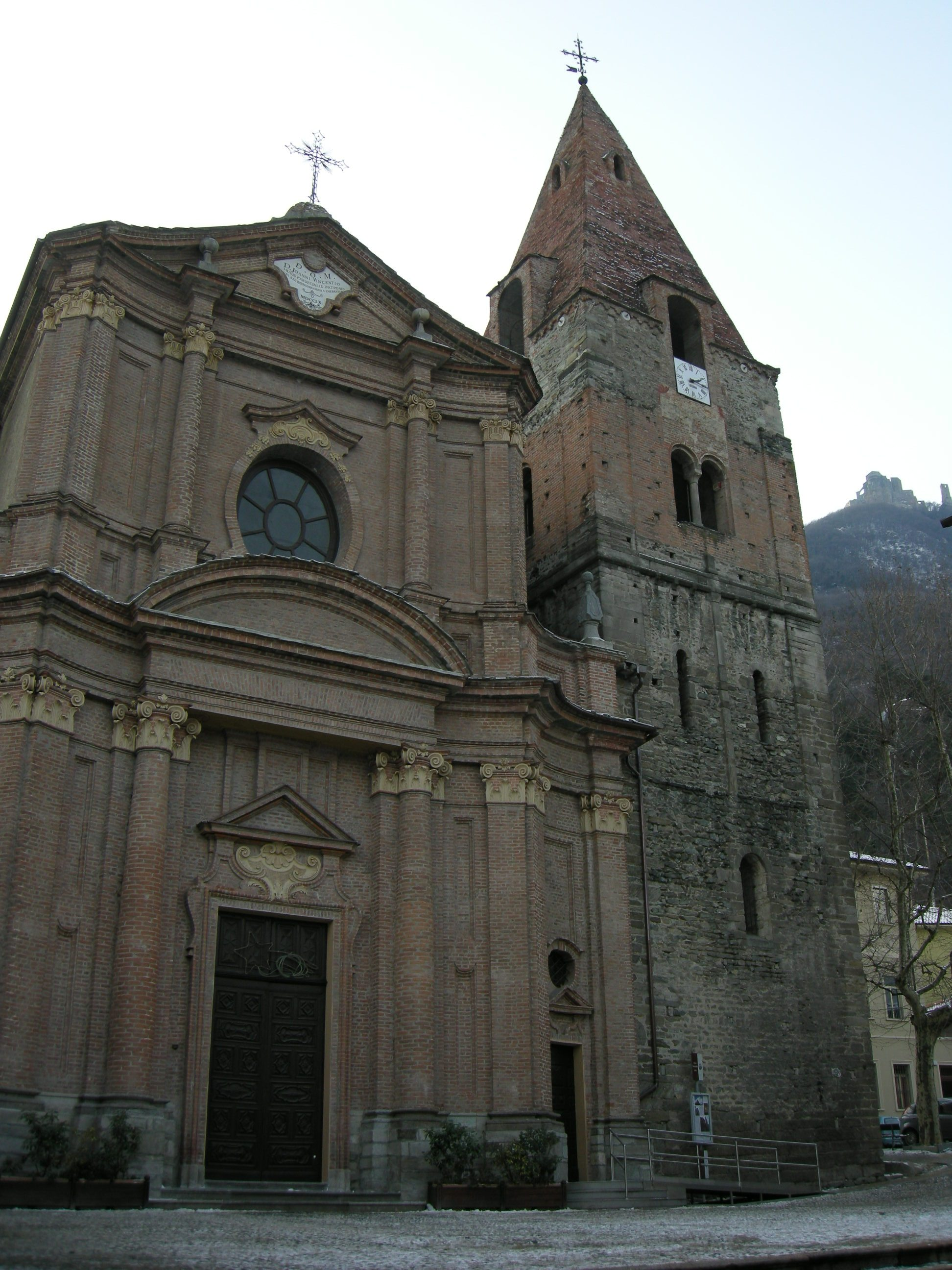 Sant'Ambrogio di Torino 03 parrocchiale e sacra